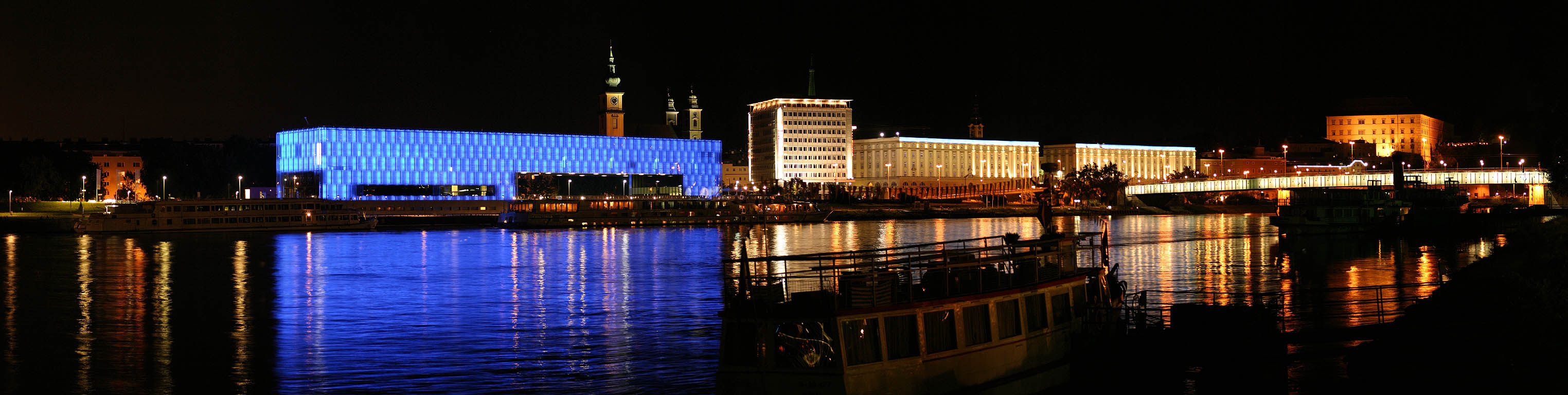 Linzer Donaulaende bei Nacht